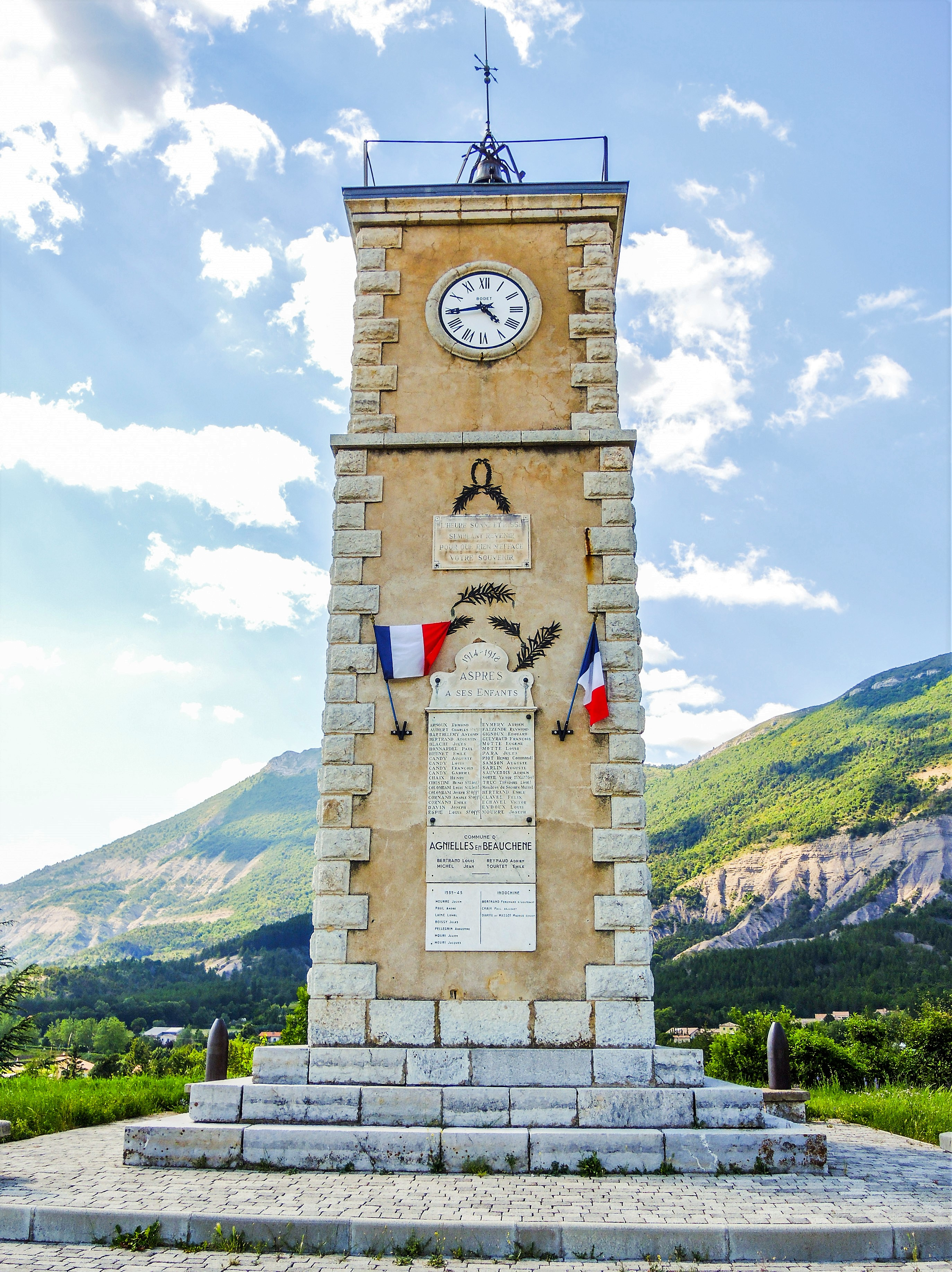 La tour-horloge, domine le village et tous les environs. Aspres-sur-Buëch. Hautes-Alpes